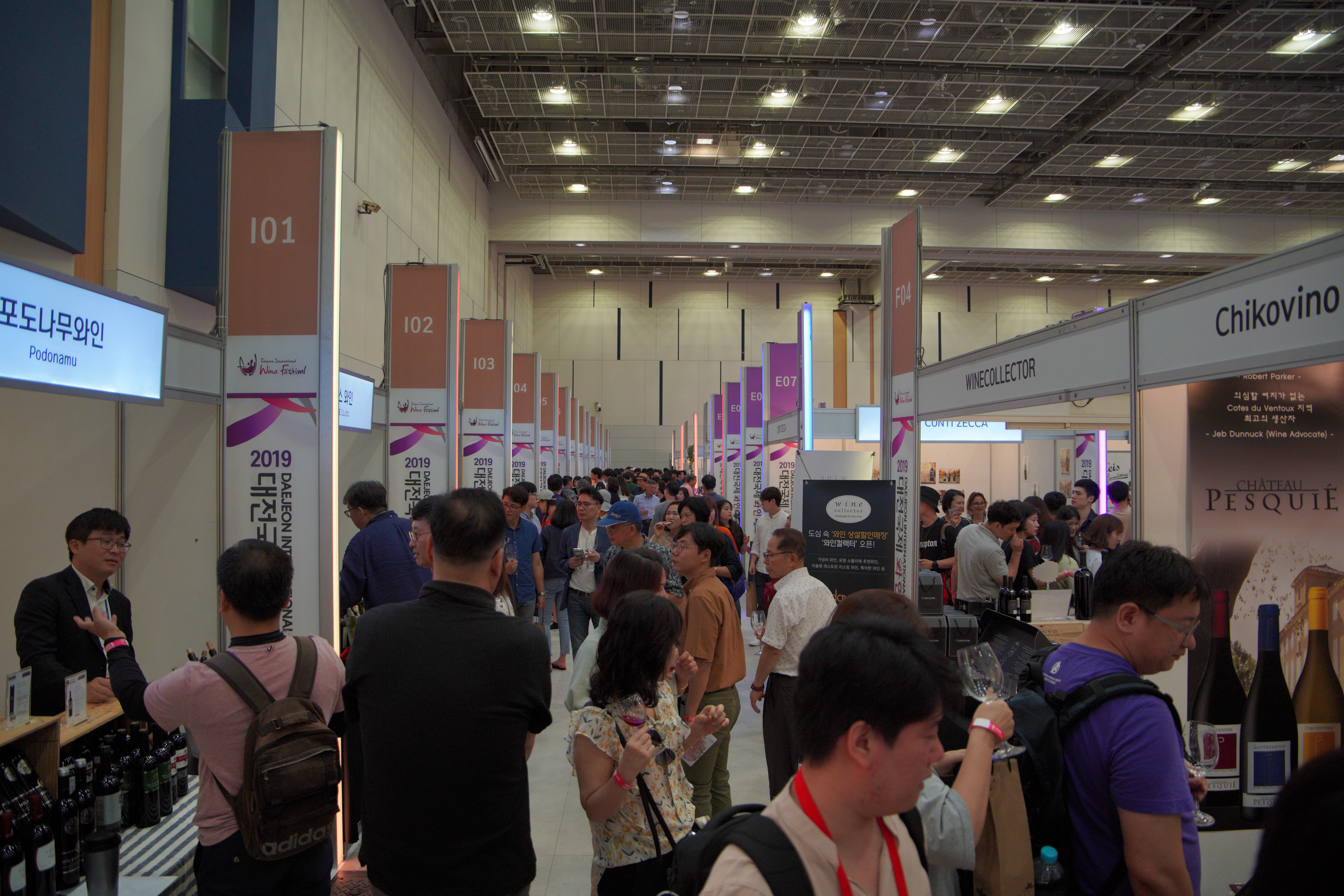 2019 대전국제와인페스티벌 (36)